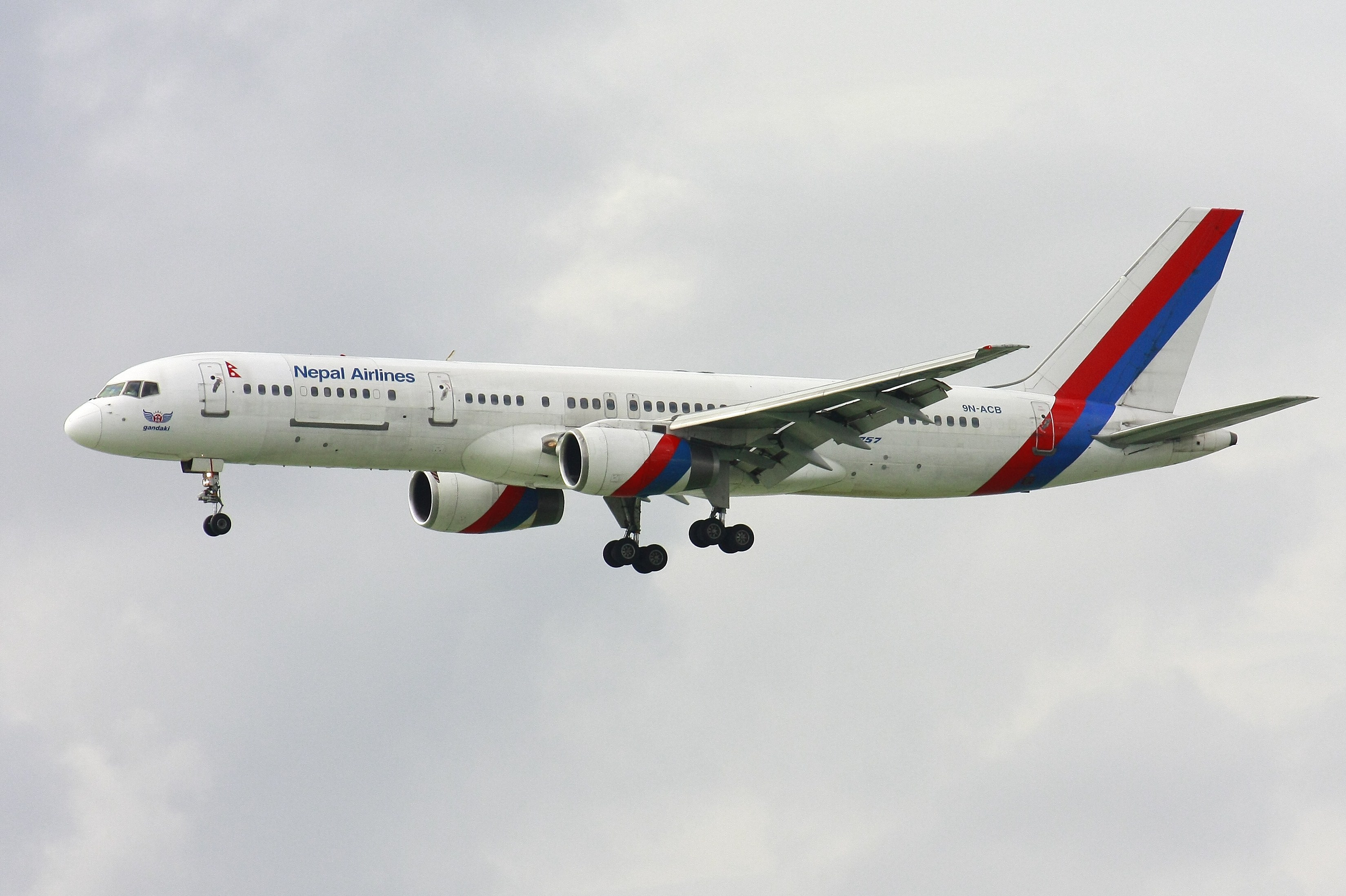 9N-ACB